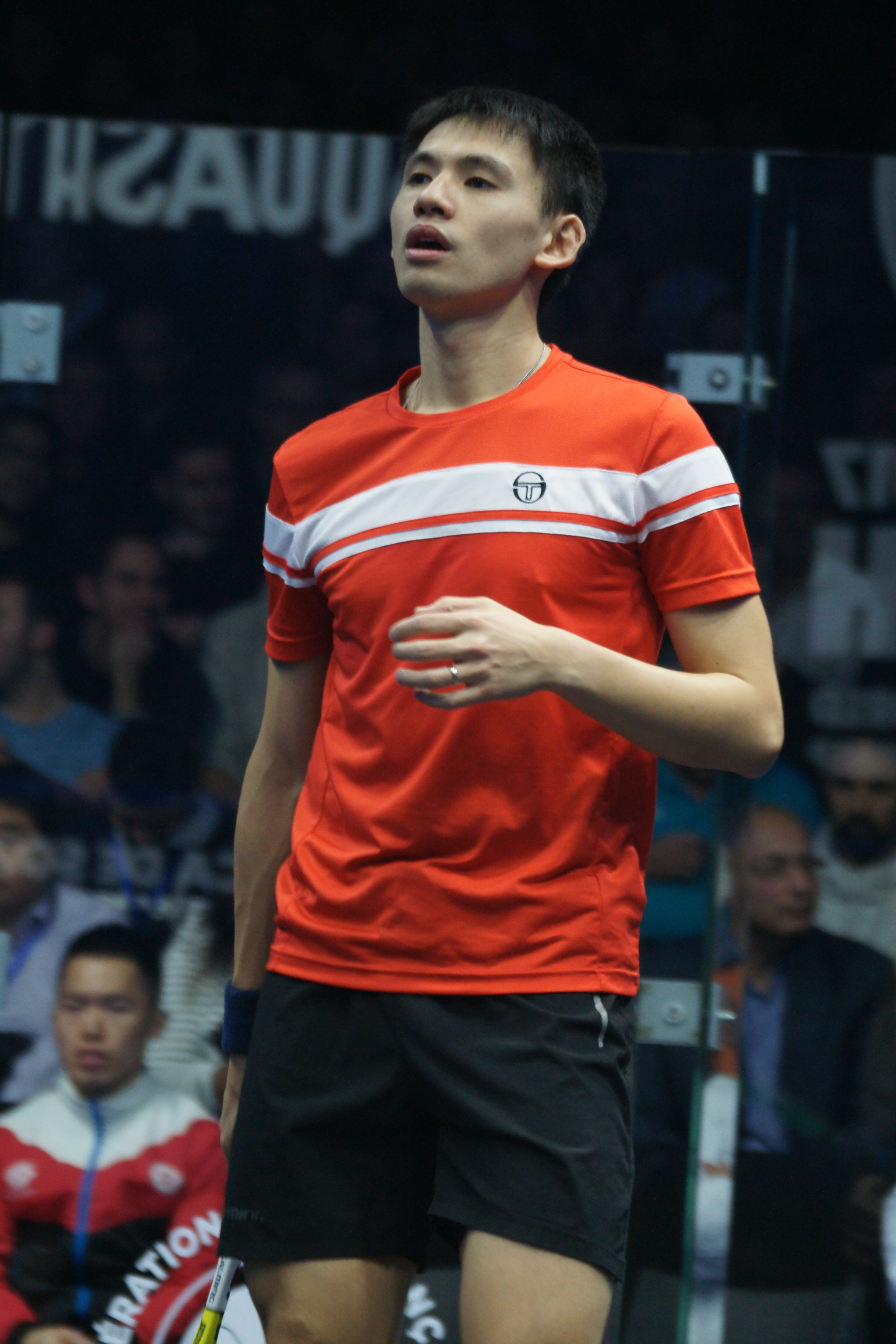 Max Lee, championnats du monde de squash par équipe Marseille 2017